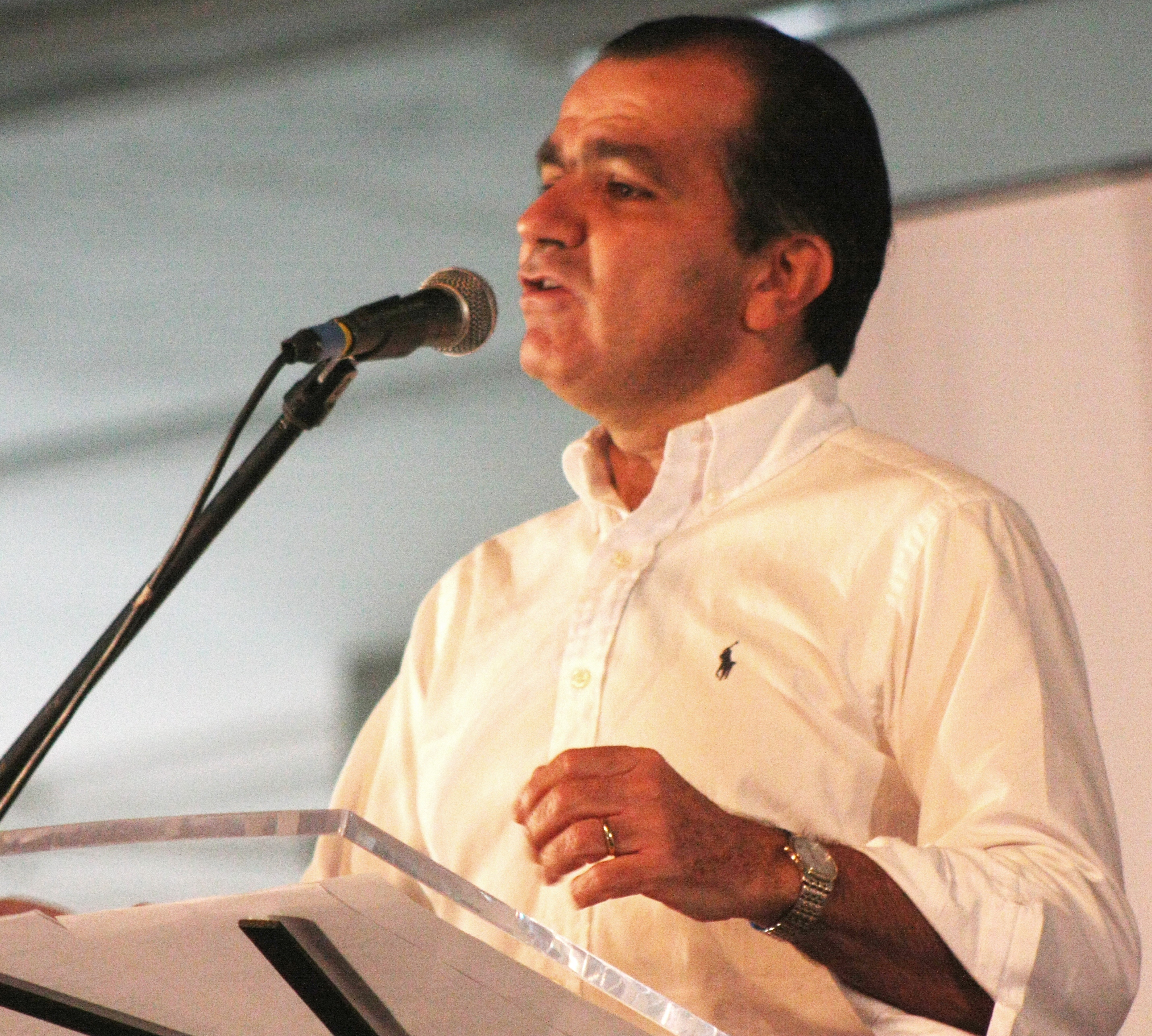 Oscar Ivan Zuluaga en Talleres Democraticos, en la ciudad de Bucaramanga